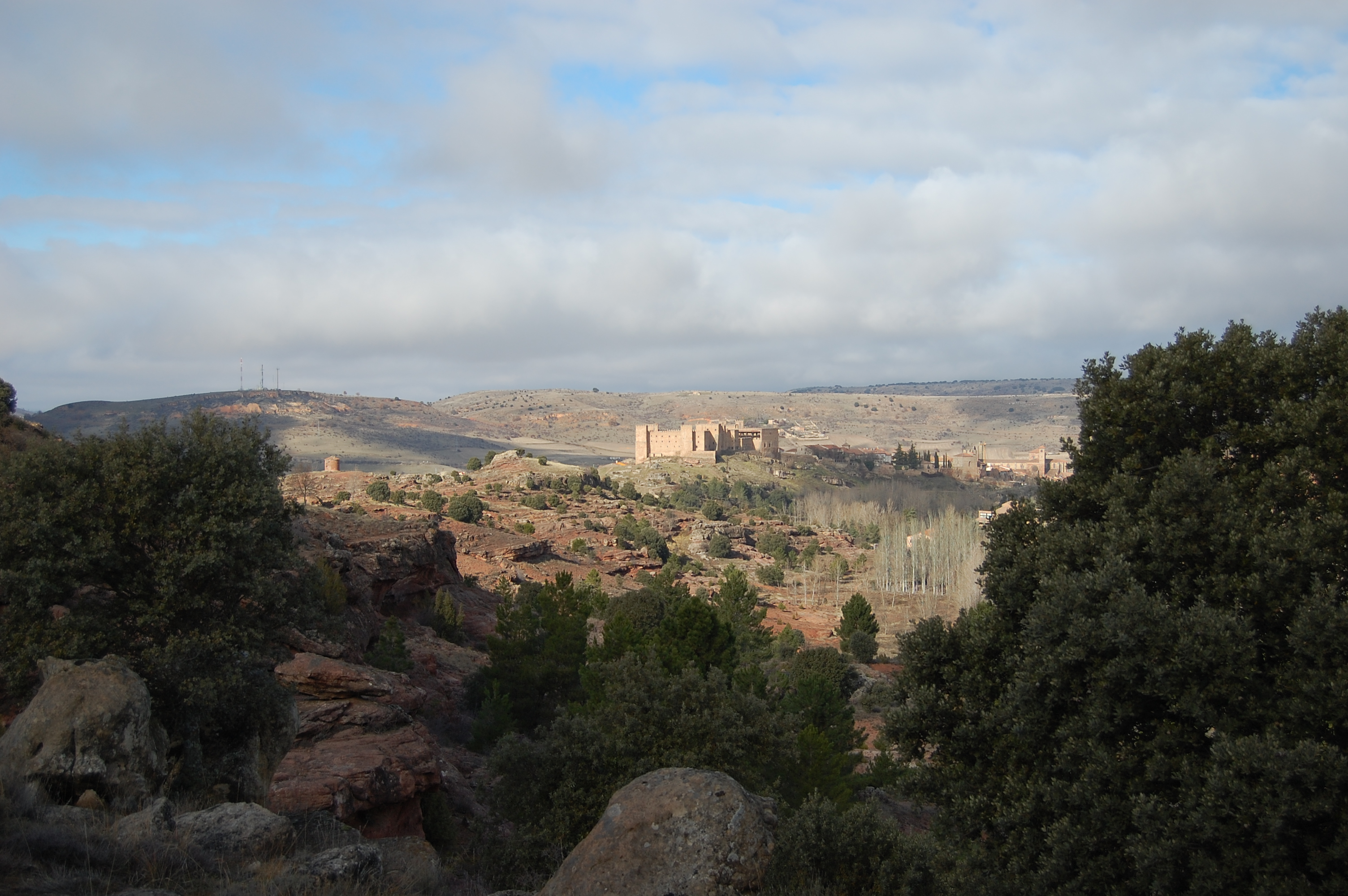 Castillo